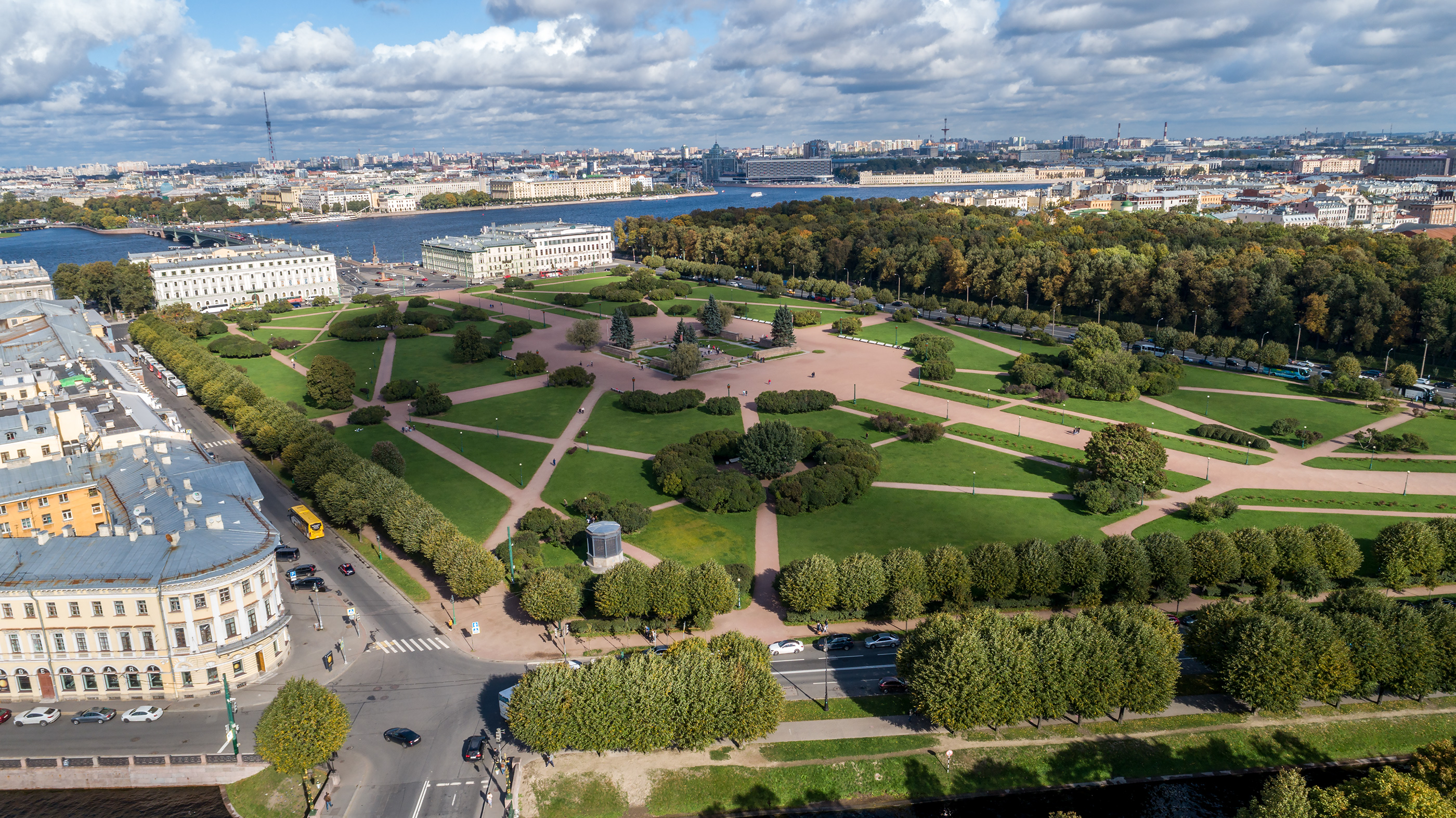 Марсово поле в Санкт-Петербурге.